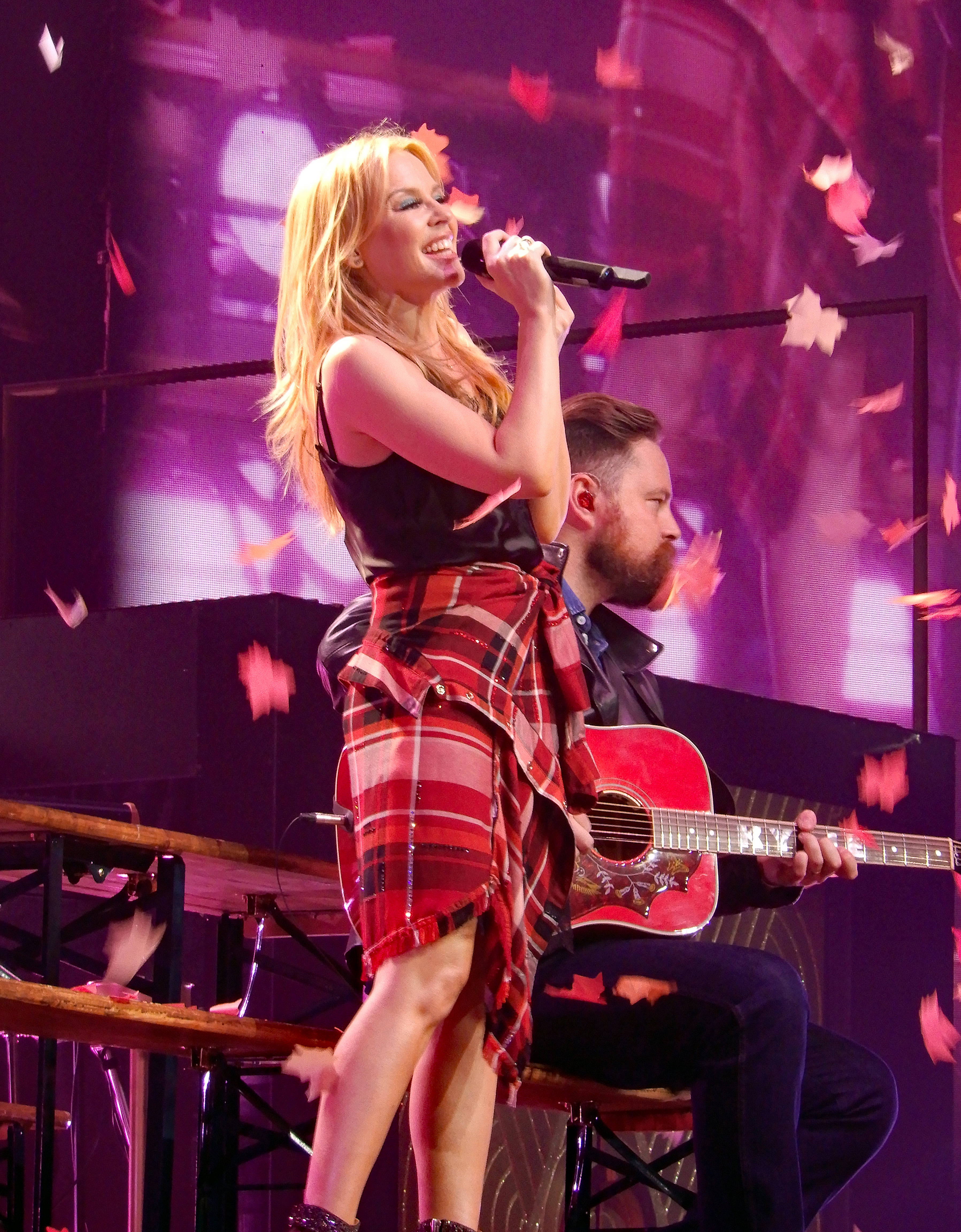 Kylie Minogue - Golden Tour - Manchester Arena - 01.10.18. - ( 39 )